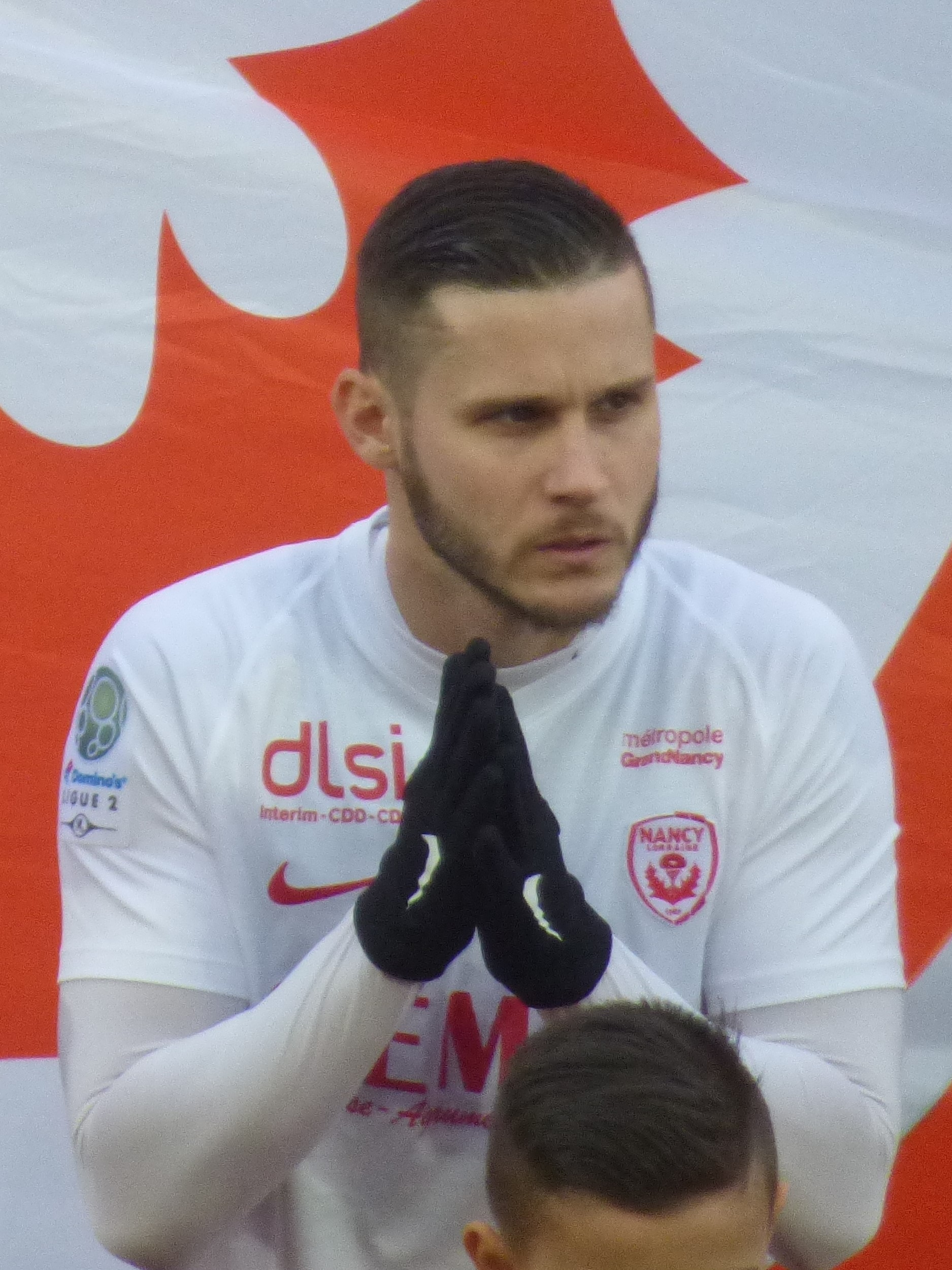 Loris Néry avant le match RC Lens / AS Nancy-Lorraine, comptant pour la vingt-et-unième journée du championnat de France de football de Ligue 2 2018-2019, le 19 janvier 2019, au Stade Bollaert-Delelis de Lens.